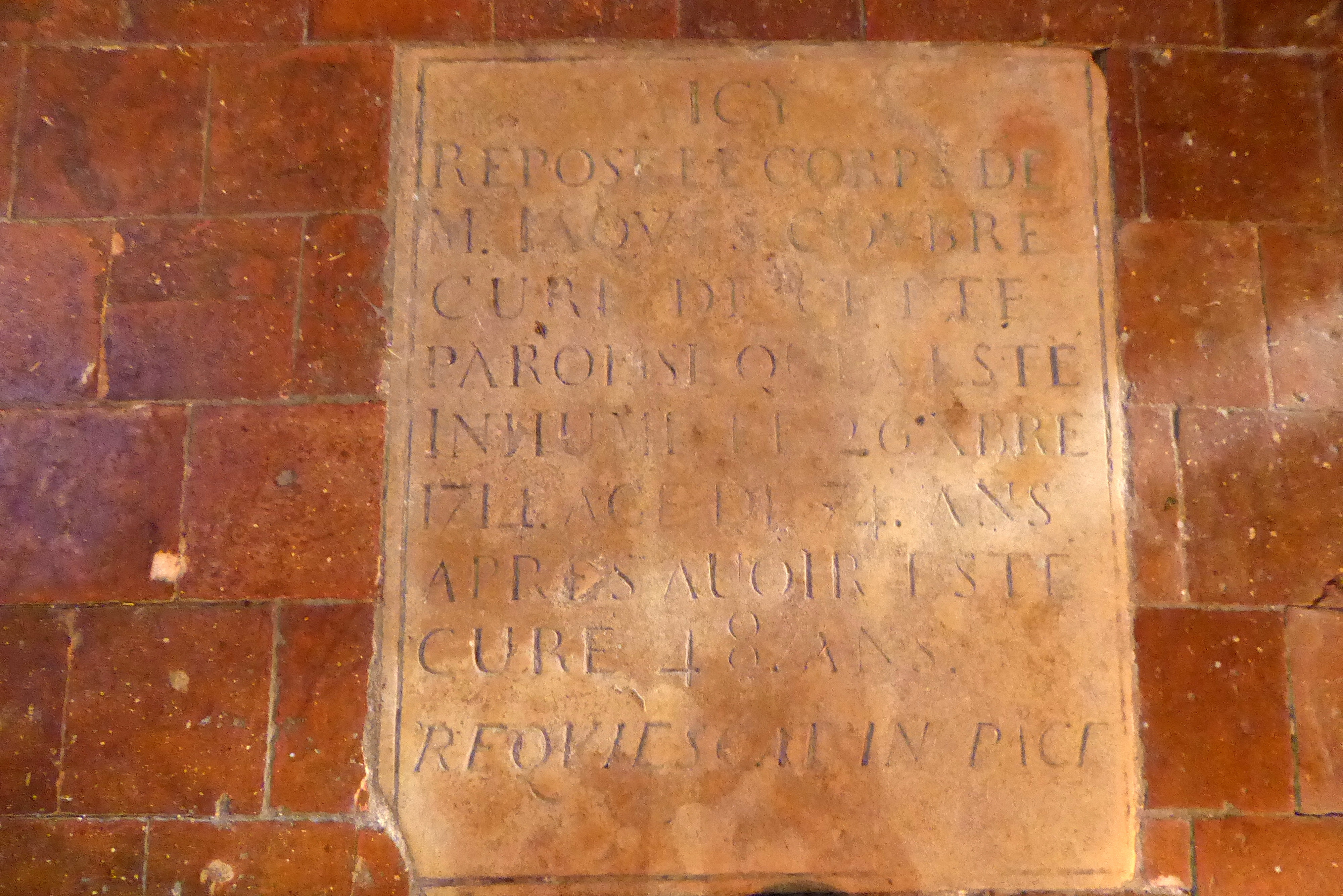 Dalle funéraire de l'église Saint-Hilaire de Mainvilliers, Eure-et-Loir (France). "Icy repose le corps de M. Jacques Coubré curé de cette paroisse qui a esté inhumé le 26 nbre 1714 agé de 74 ans après avoir esté curé 48 ans. Requiescat in pace."